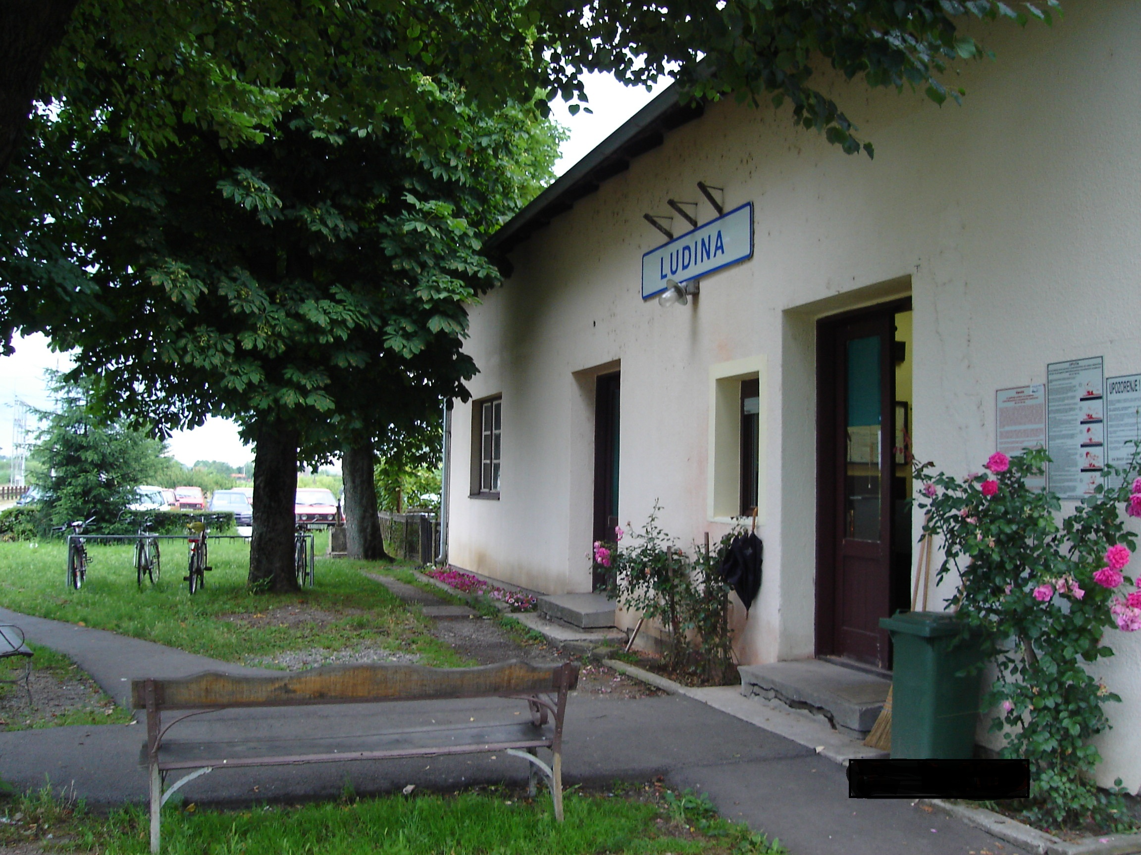 željeznički kolodvor v.ludina